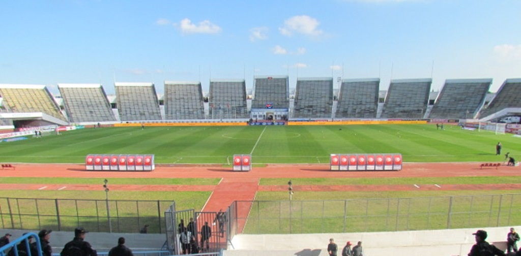 Stade Olympique d'El Menzah avant le match entre l'Espérance Sportive de Tunis et l'Olympique de Béja le 10 décembre 2016